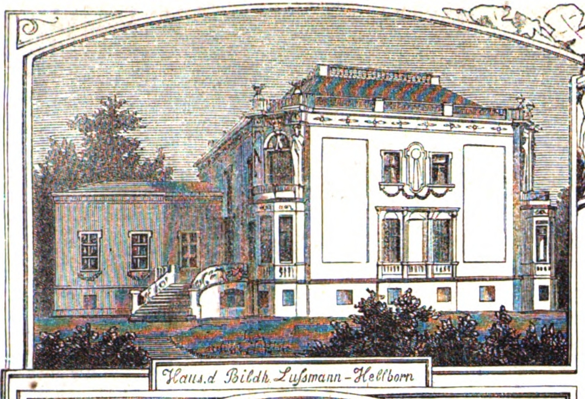 Haus des Bildhauers Sussmann-Hellborn in Berlin, 1866.